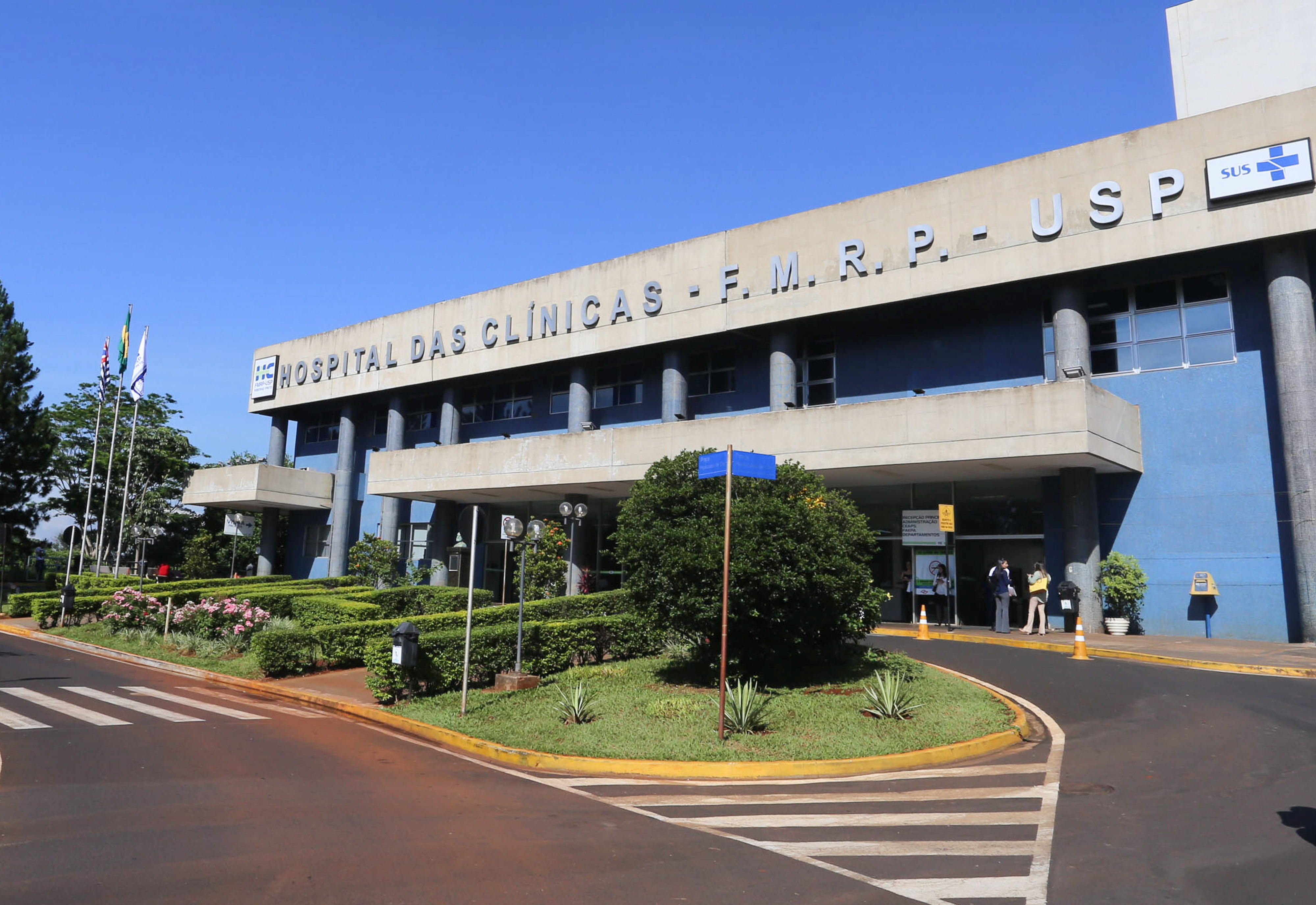 O governador do Estado de São Paulo e o secretário de Estado da Saúde, David Uip, entegam o HC Criança do Hospital das Clínicas da Faculdade de Medicina de Ribeirão Preto (HCFMRP). Local: Ribeirão Preto/SP Data: 28/11/2017 Foto: Gilberto Marques/A2img